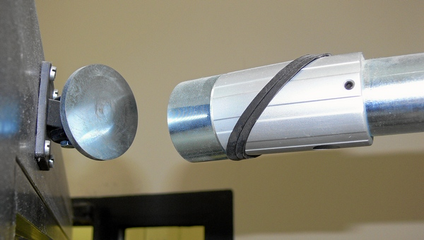 Türhaftmagnet mit schwenkbarer Ankerplatte. Dient zum Feststellen von Brandabschlüssen.